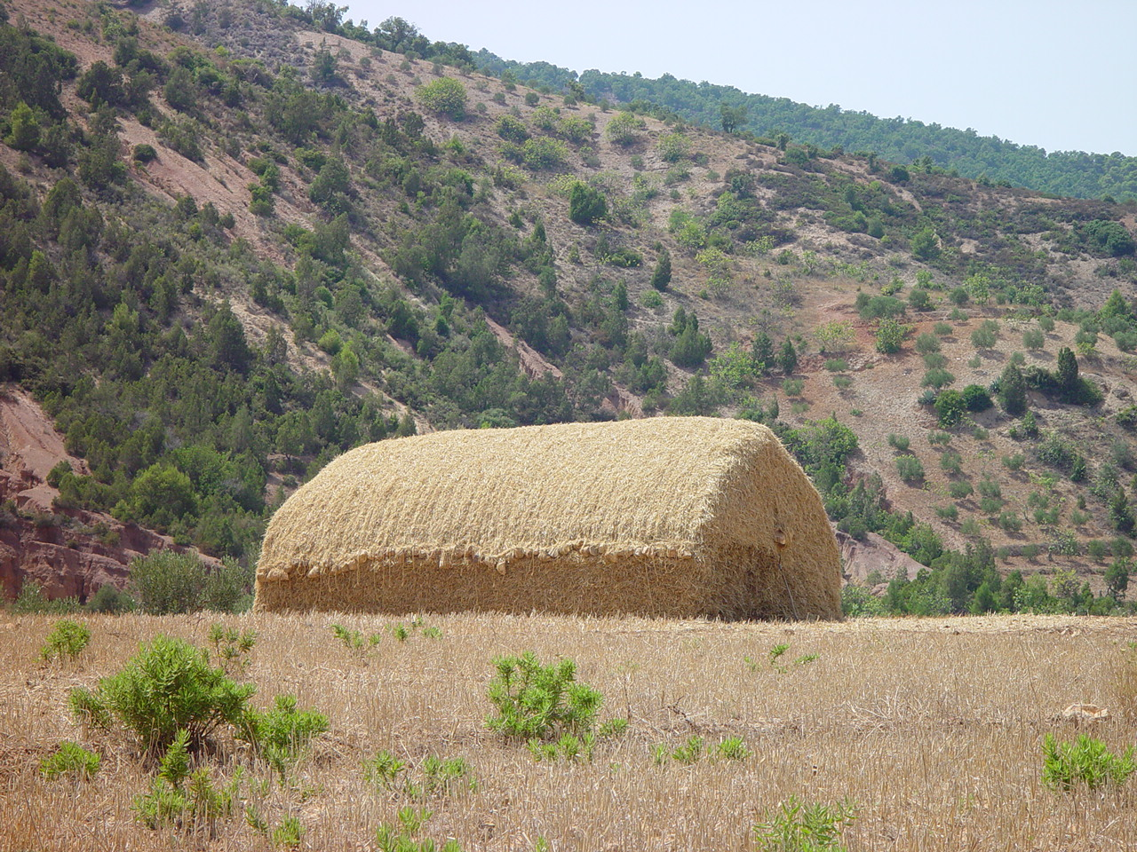 Foto van een hooiberg en een deel van de vele bossen rondom het plaatsje IKEBALEN of IKABAREN in ::Temsamane (gemeente)|Temsamane .